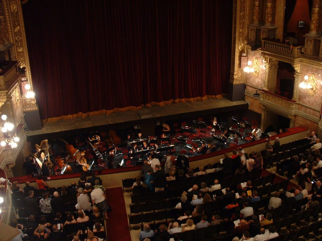 Zenekari árok a Magyar Állami Operaházban